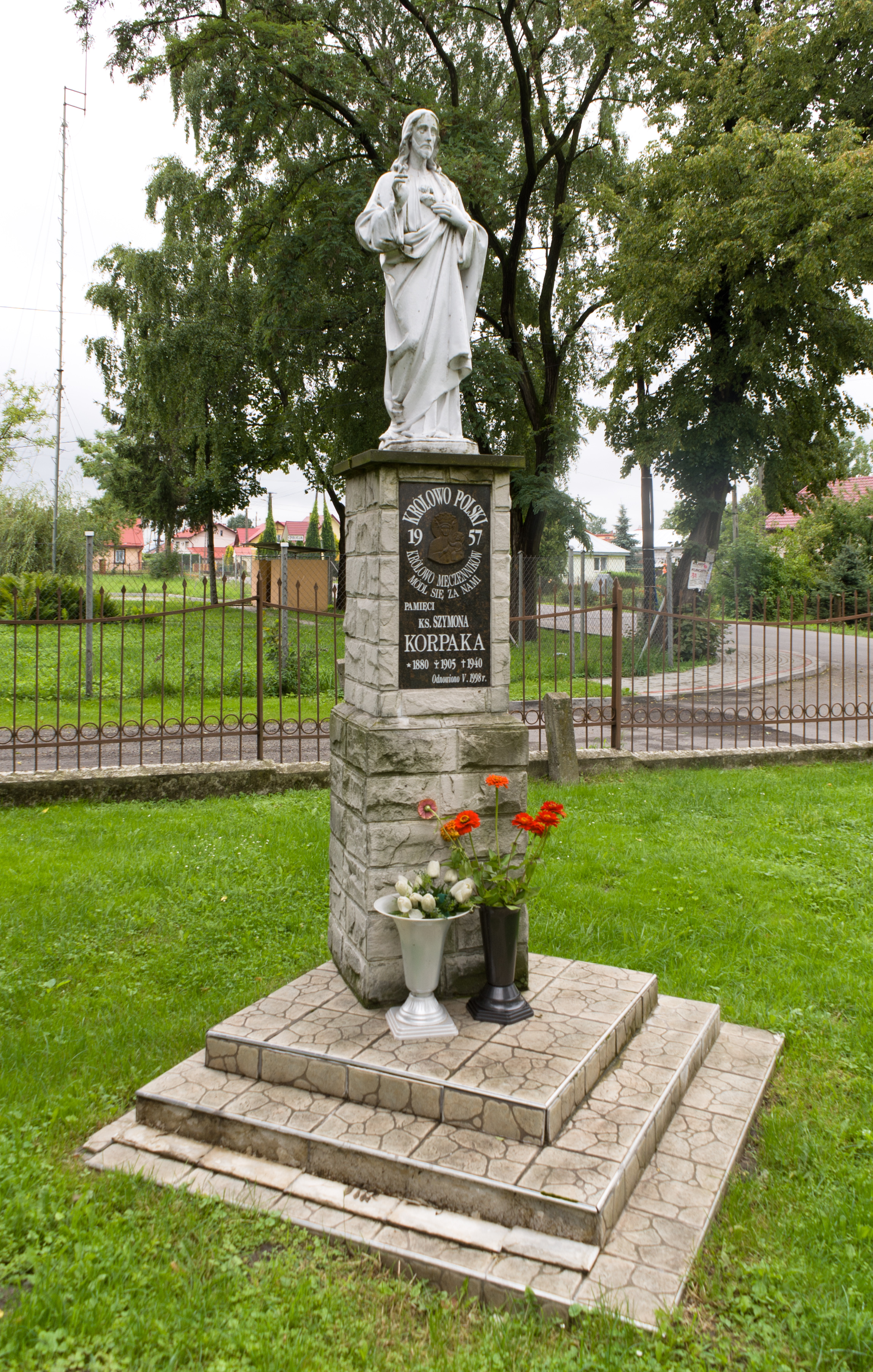 Pomnik ku pamięci ks. Szymona Korpaka przy zabytkowym kościele pw. św. Piotra i św. Pawła w Medyce.